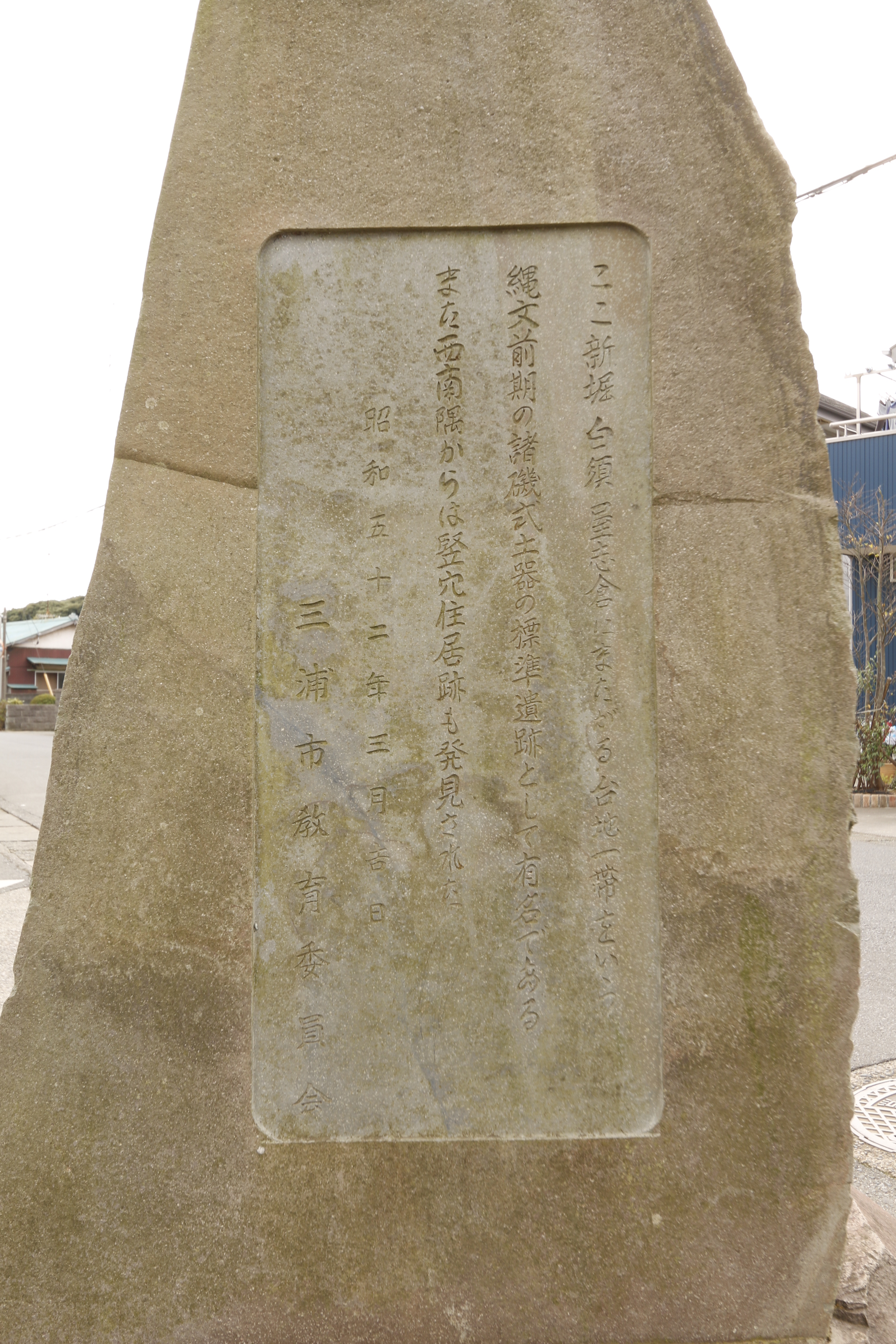 諸磯遺跡の石碑（裏面）